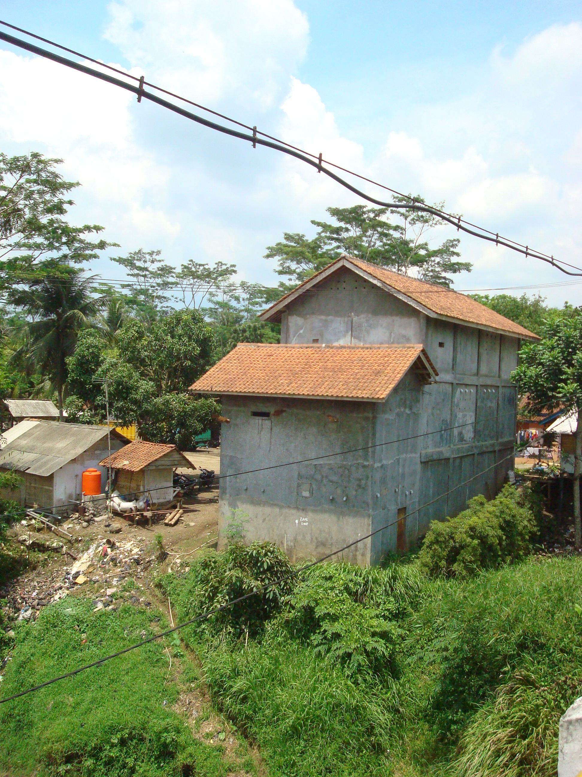 Schwalbenhaus zur Produktion von Vogelnestern an der Distriktsgrenze West- Zentraljava